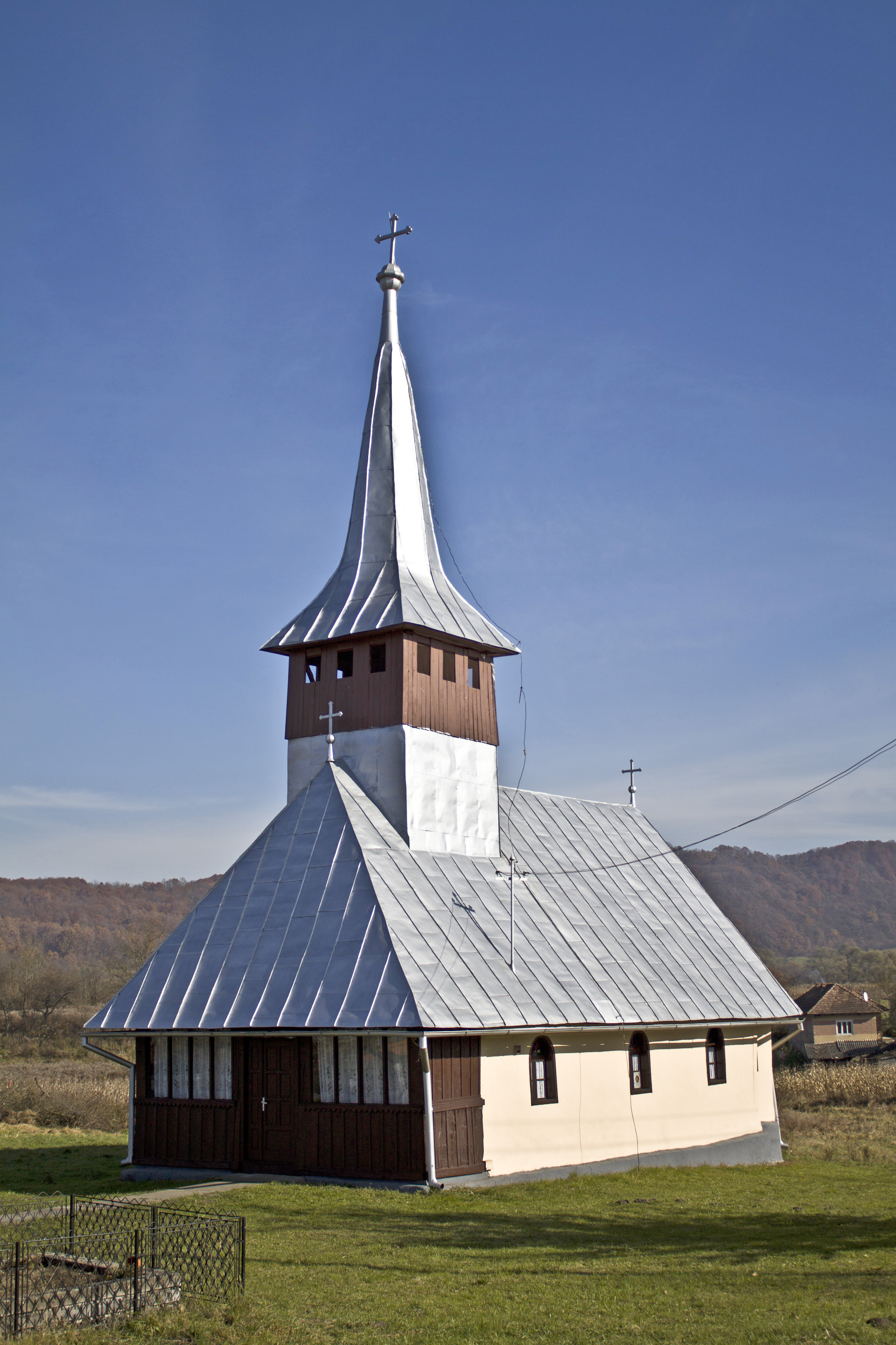 Biserica de lemn din Rogna se află în localitatea omonimă din comuna Ileanda, județul Sălaj și a fost construită în a doua parte a secolului XIX. (wikipedia)